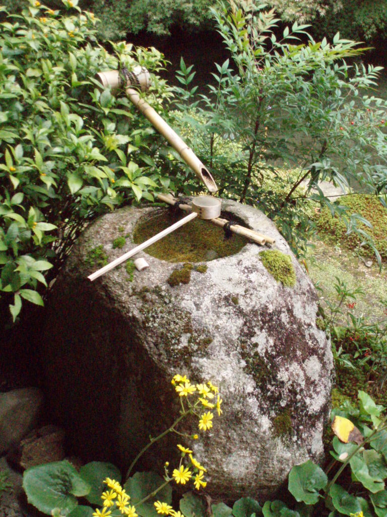 蓮華寺庭園のつくばい